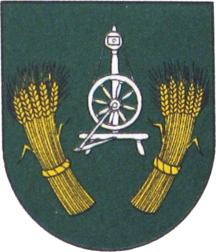 Erb obce Kuková (HR: K-171/2001): V zelenom štíte je strieborný kolovrátok, medzi úzkymi zlatými prehnutými snopmi. Autormi erbu sú Peter Kónya, Sergej Pančák a Leon Sokolovský.